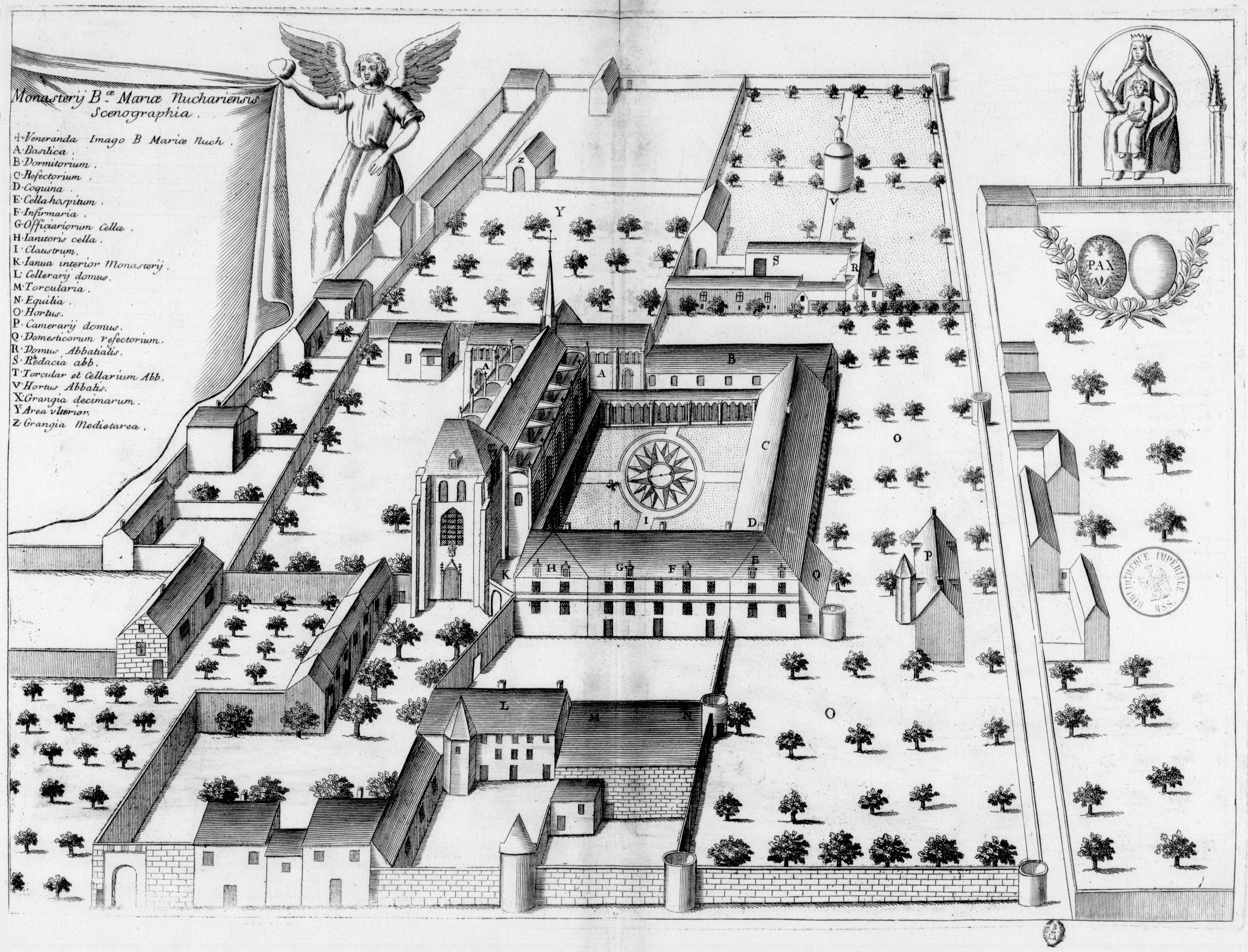 Planche gravée du 17ème siècle représentant l'abbaye Notre-Dame de Noyers, dans le livre Monasticon Gallicanum.